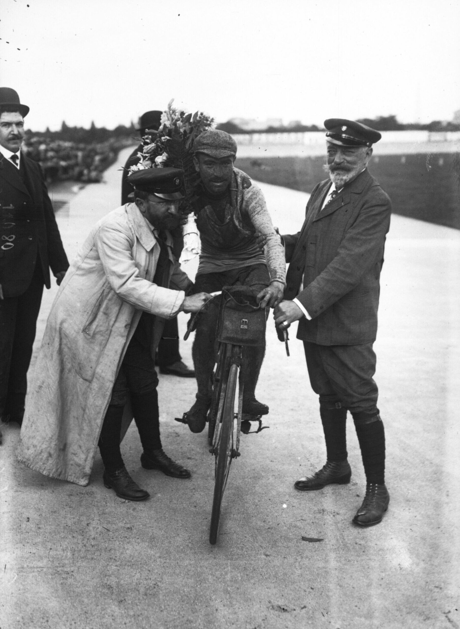 Octave Lapize à l'arrivée du Tour de France 1910